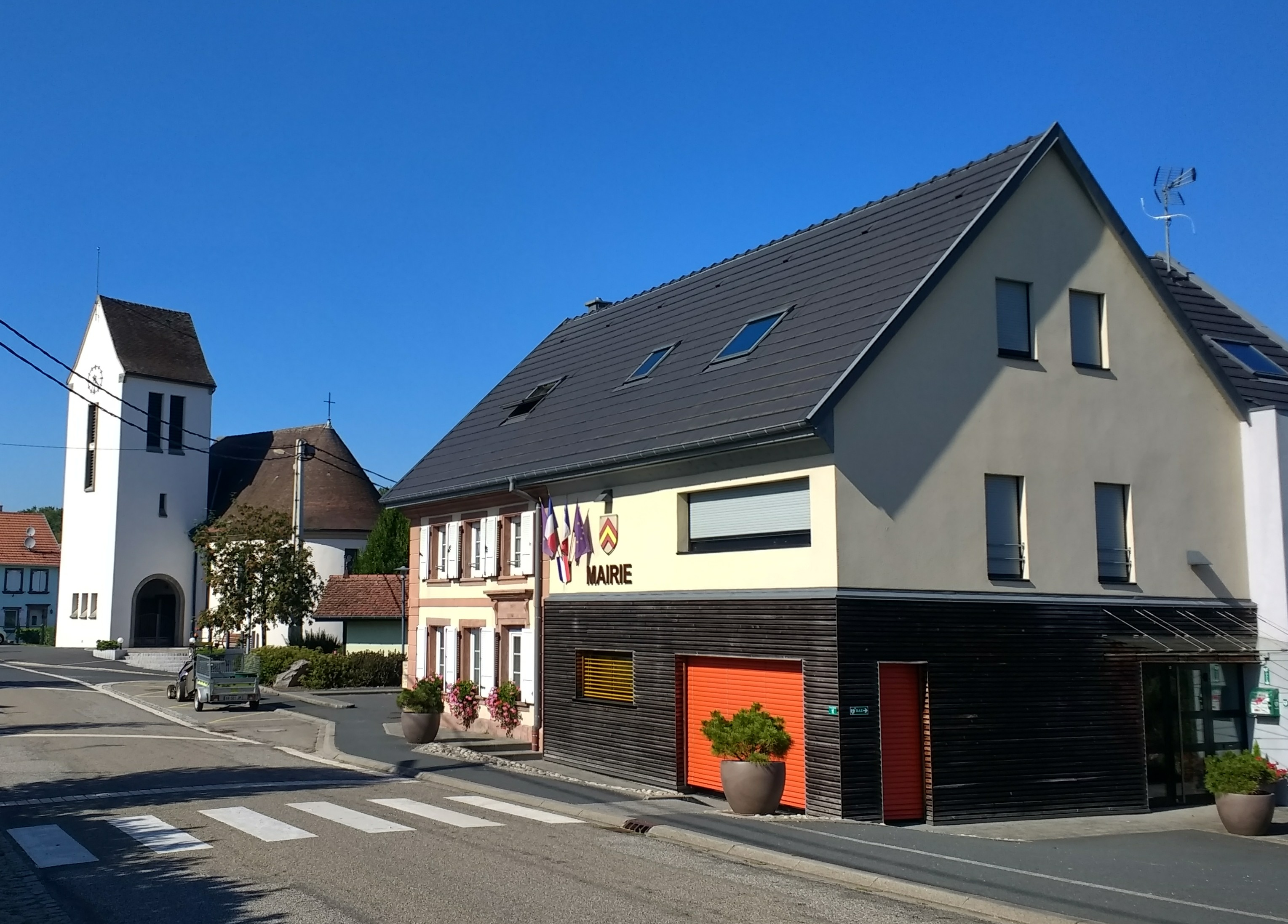 Église et mairie de Gungwiller